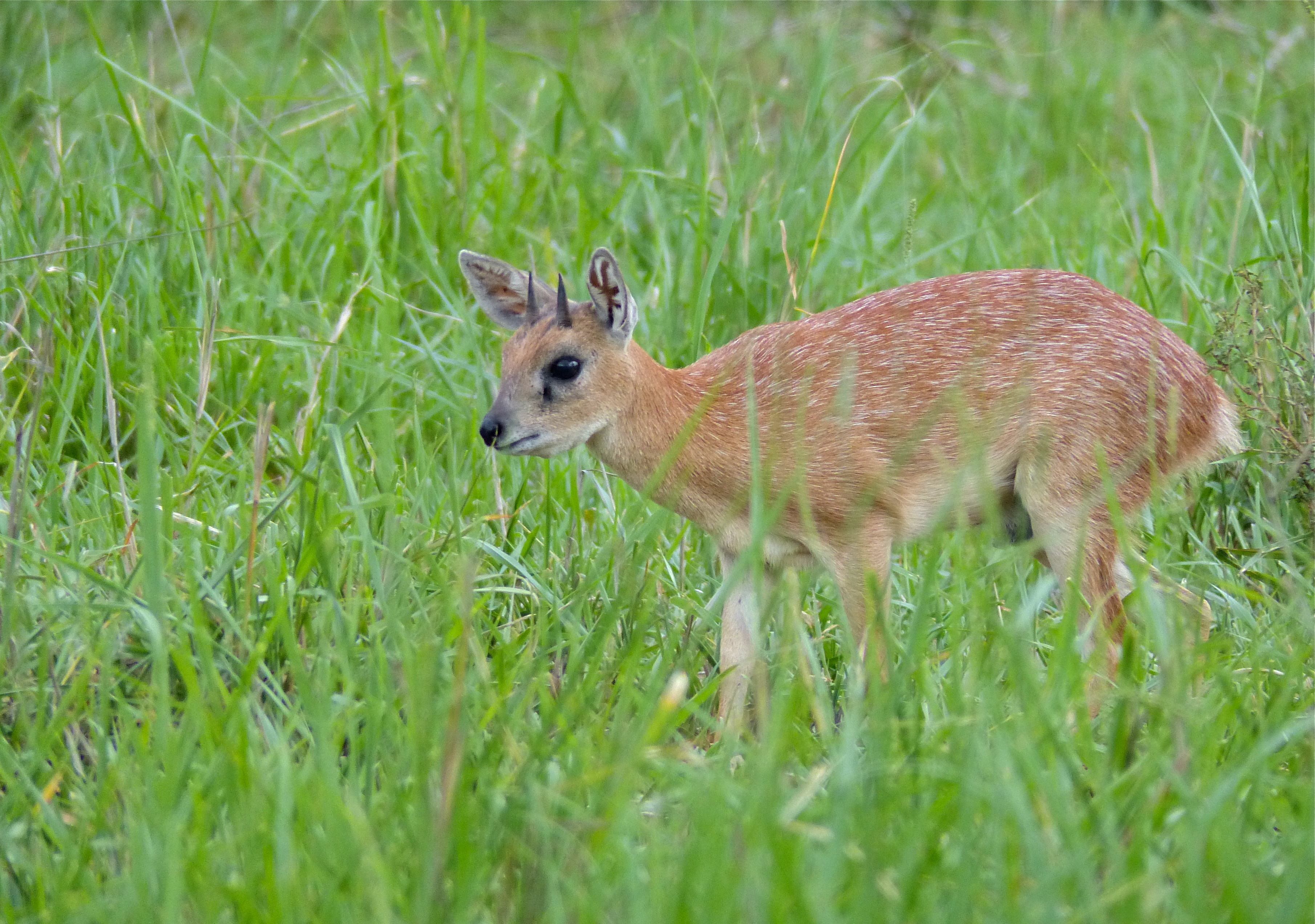 Mahonie Loop near Punda Maria, Kruger NP, SOUTH AFRICA